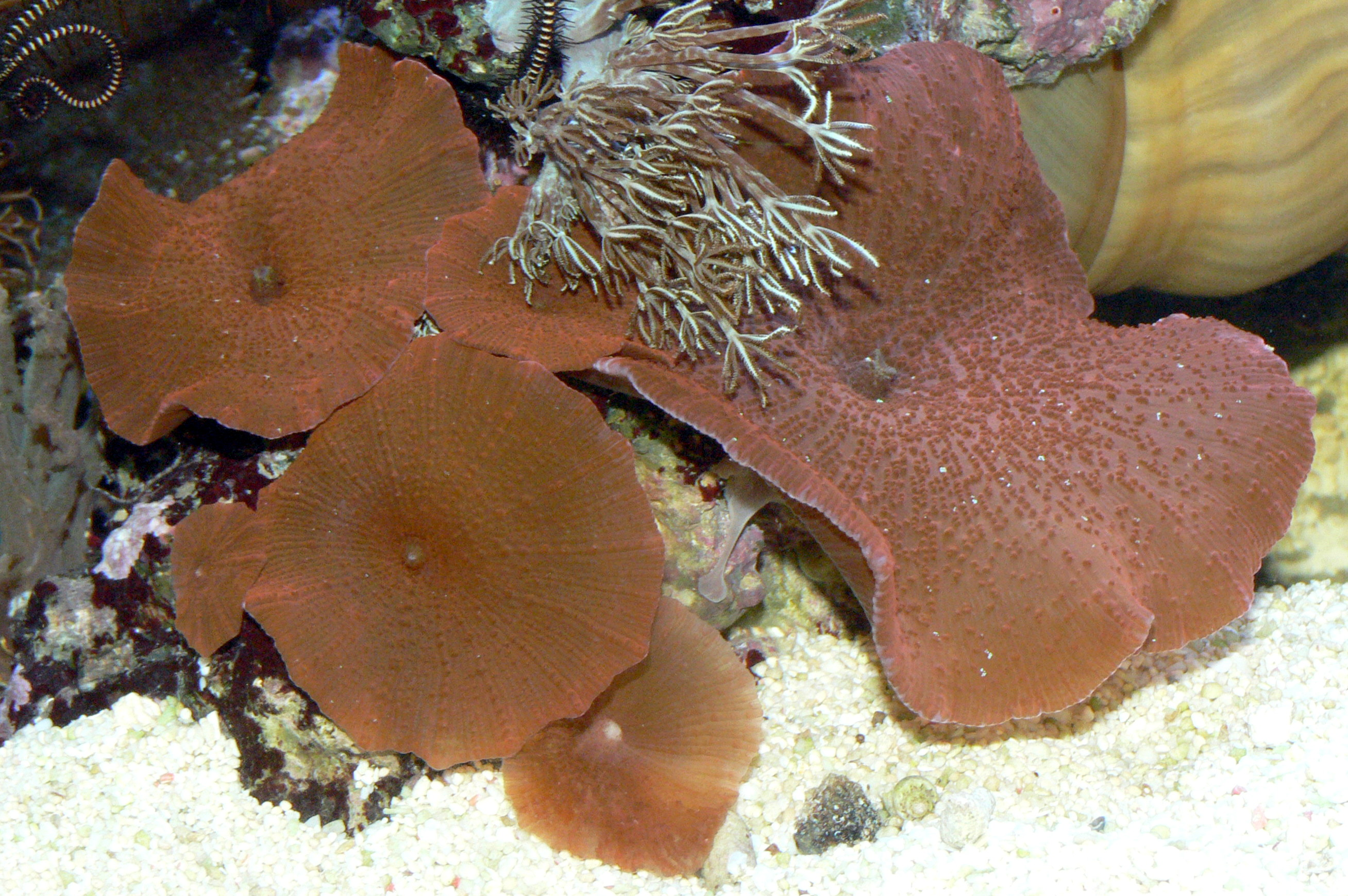 Discosoma sp.